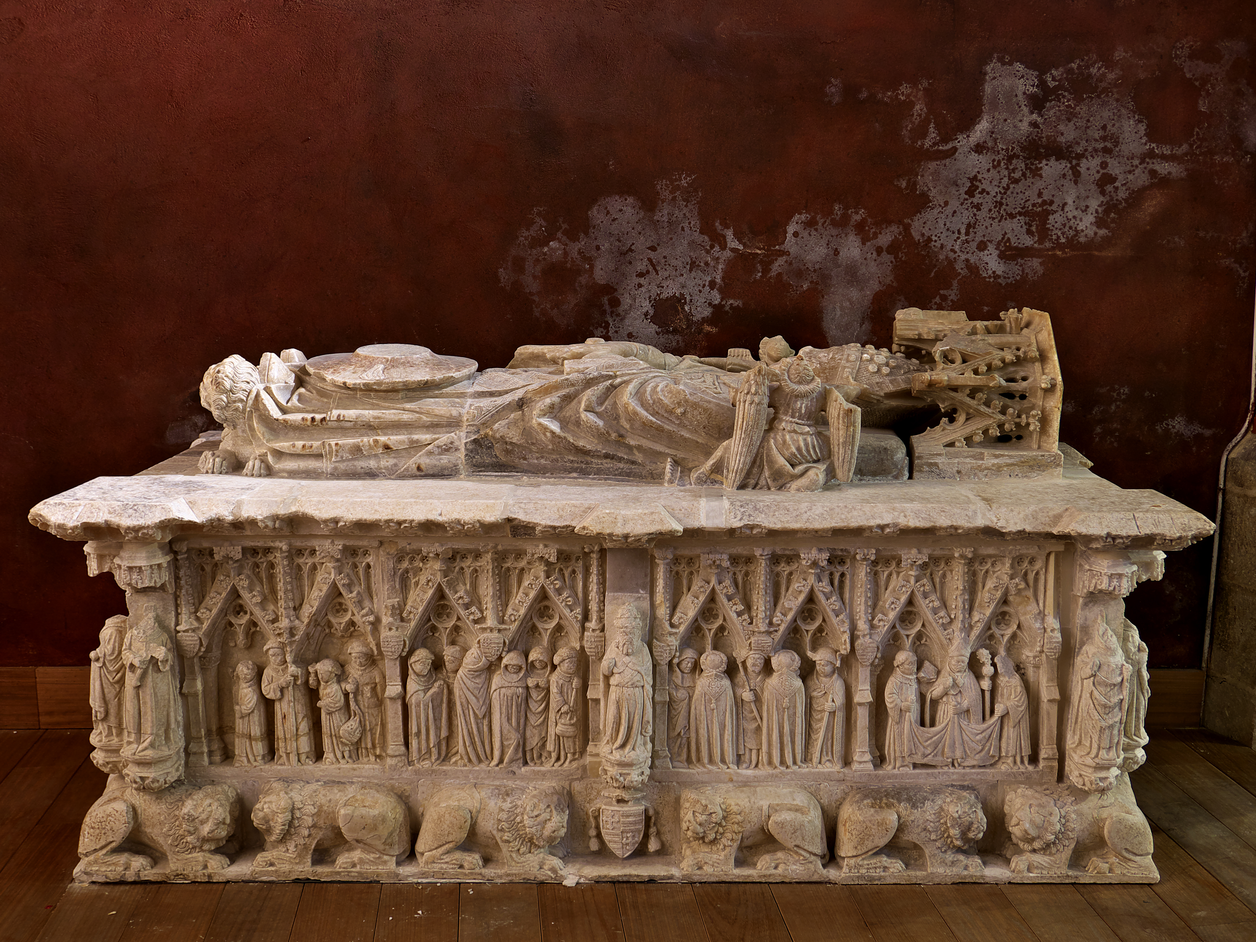 Capilla de los Santos Lorenzo, Prudencio y Catalina, Catedral de Nuestra Señora de la Huerta de Tarazona. Sepulcro de Fernando Pérez Calvillo (†1404), obispo de Tarazona (1391-1404) y cardenal (1397) de los Santos XII Apóstoles. Sepultura tallada en alabastro de Pere de Corcan (1405).